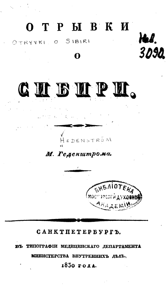 Обложка книги Геденштрома Матвея Матвеевича